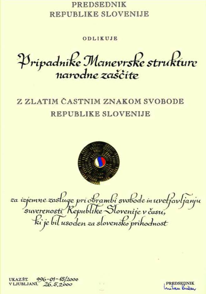 Odlikovanje Zlatni častni znak svobode Republike Slovenije za pripadnike Manevrske Strukture Narodne zaščite